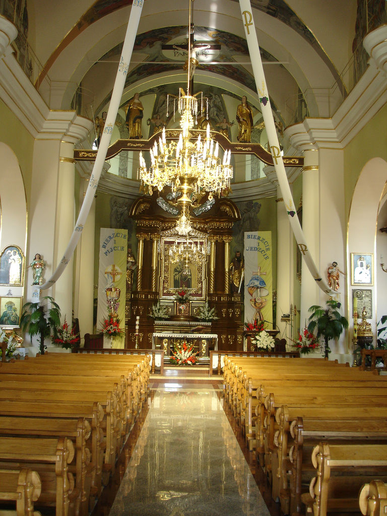 Parish Nowotaniec - inside, Juni 2005